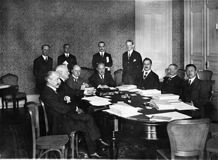 комиссия Блокады Лиги Наций